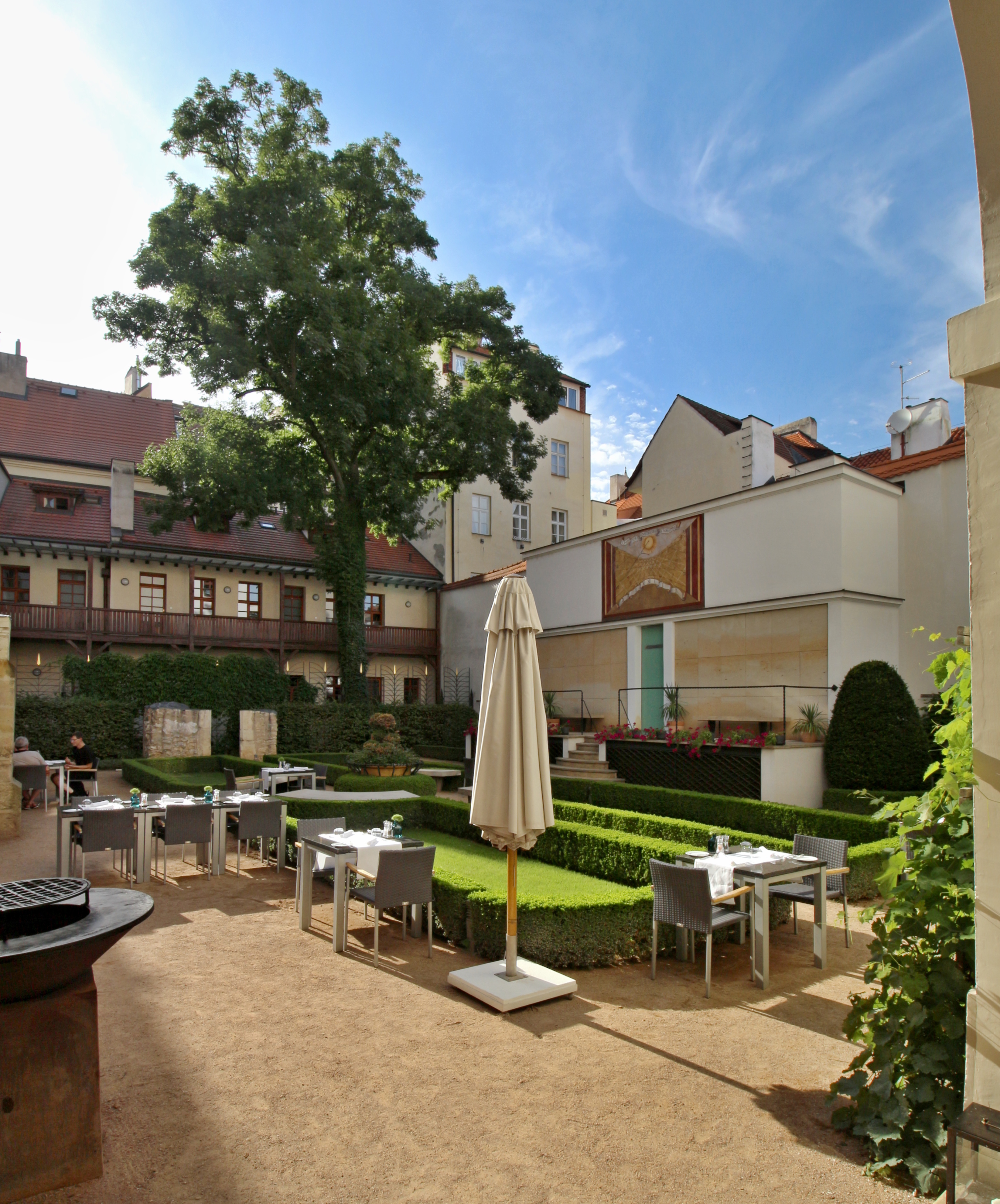 Malá Strana, klášter augustiniánů u sv. Tomáše